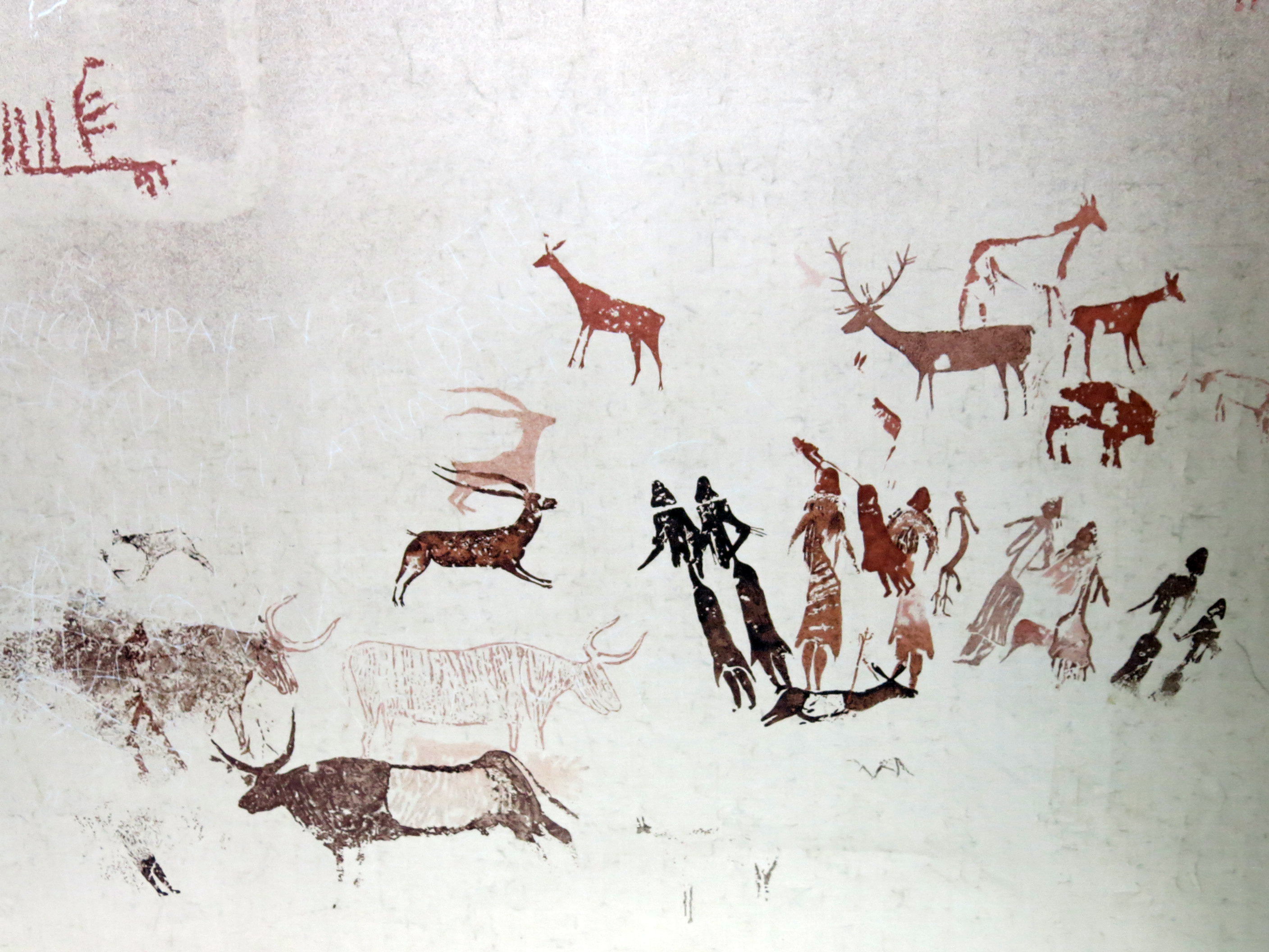 Pintures de la cova dels Moros, exposició al Museu de Gavà